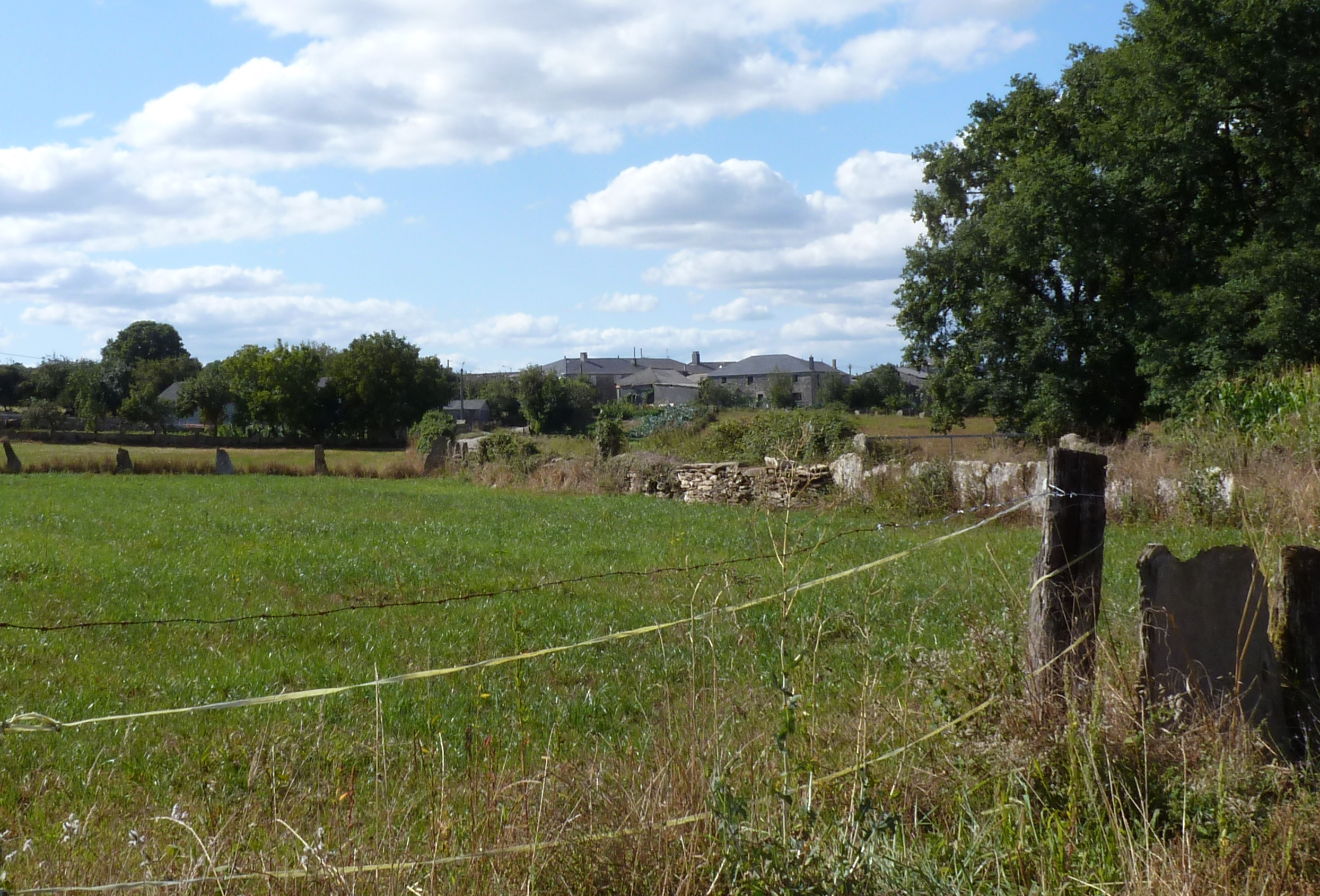 Lugar de Penaxubeira, parroquia da Cervela, concello do Incio